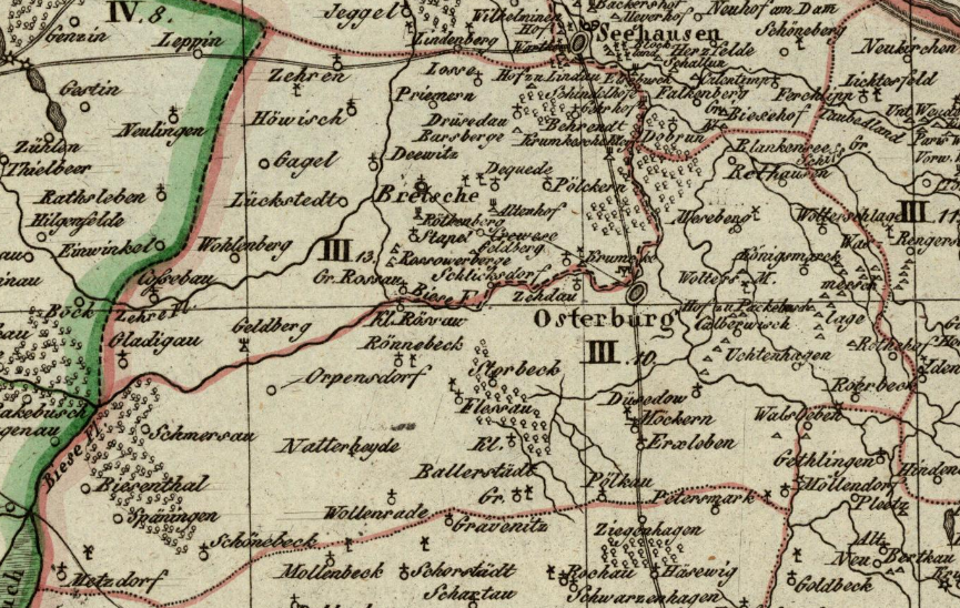 Die Kantone Bretsche und Osterburg im Distrikt Stendal, Departement der Elbe, Königreich Westphalen